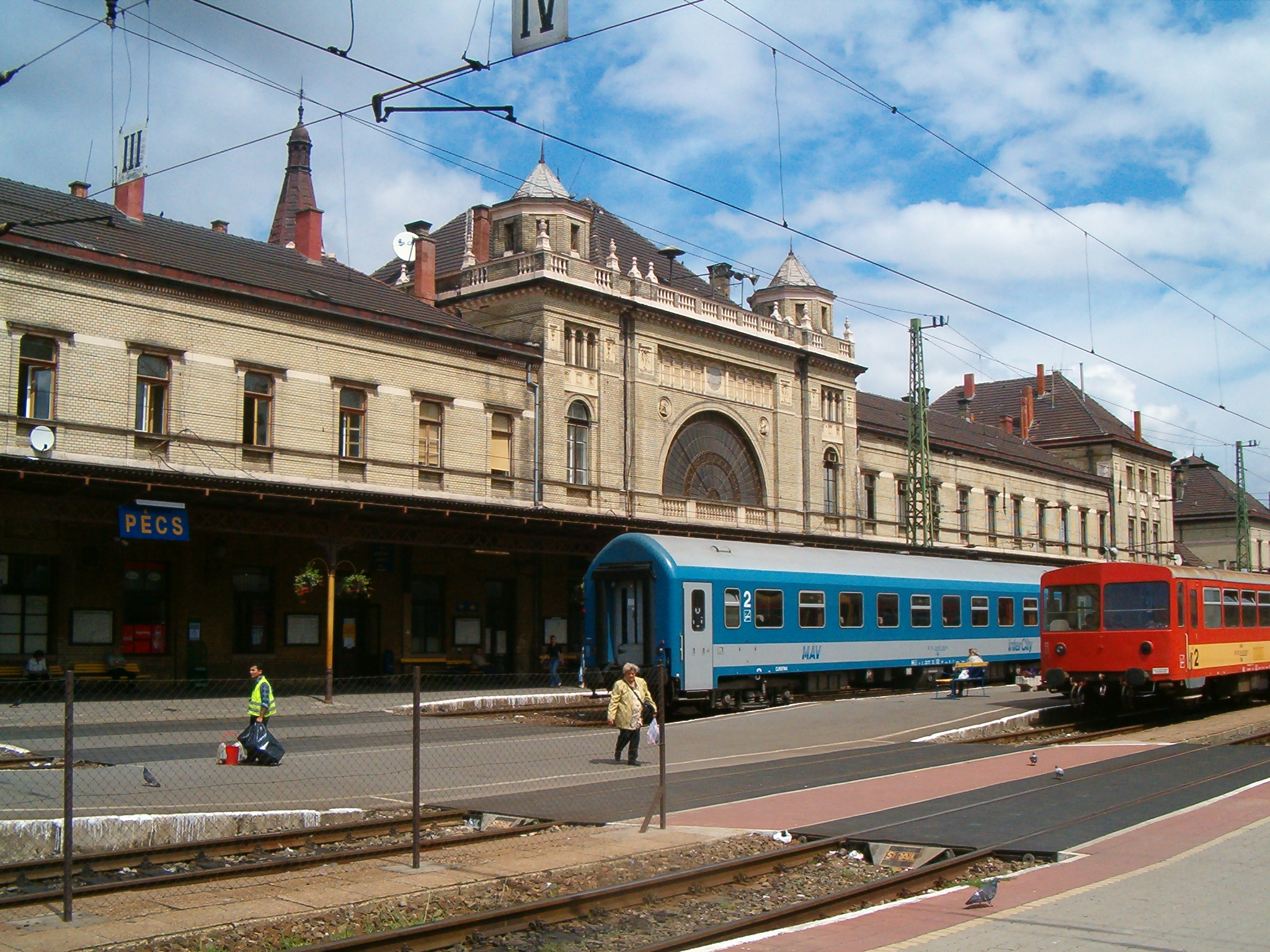 Pécs, vasútállomás